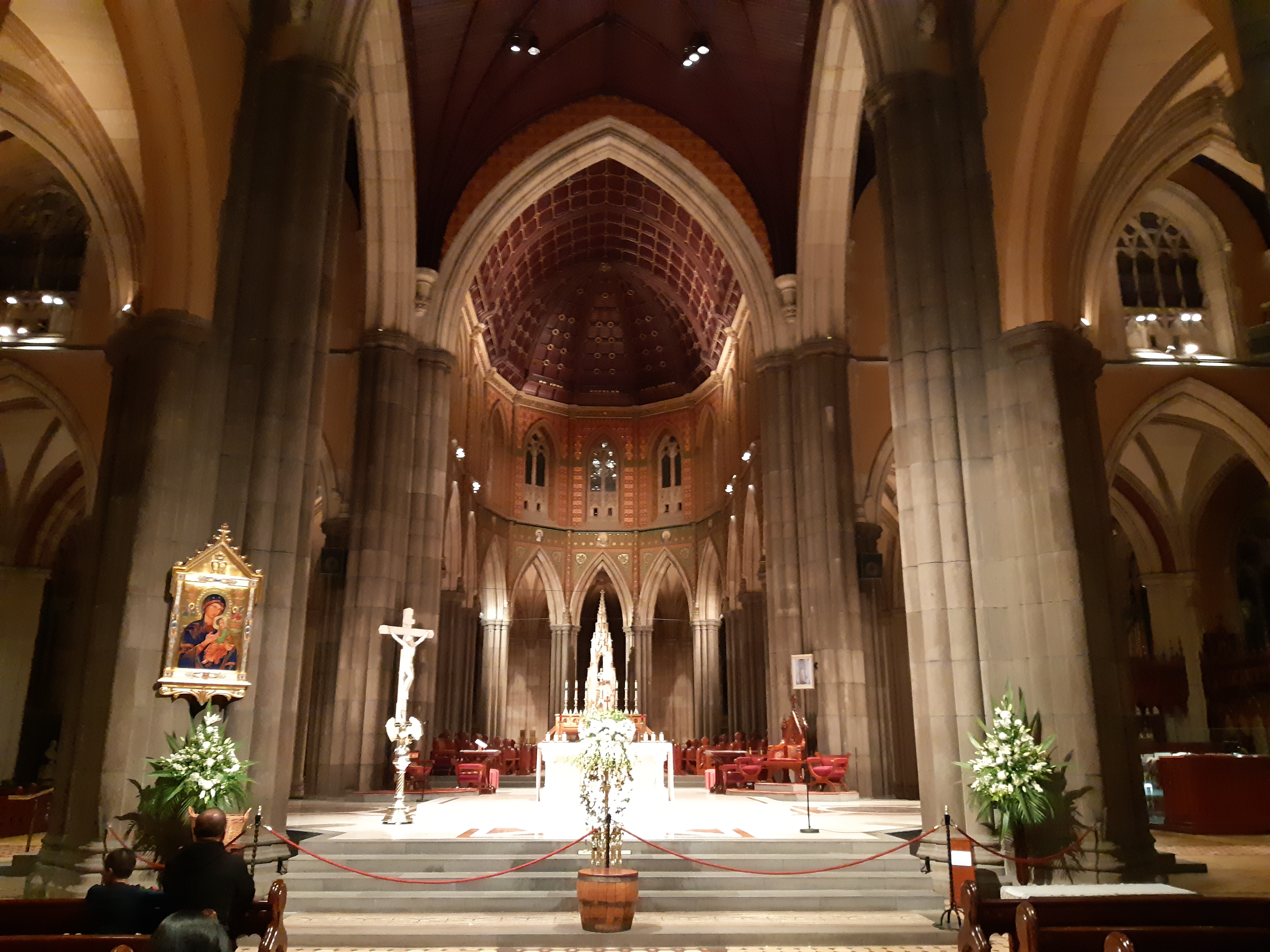 Katedral Santo Patrick, Melbourne